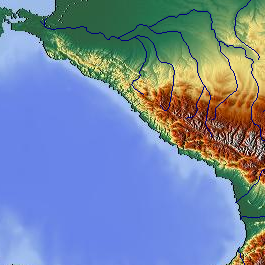 Schwarzes Meer, from